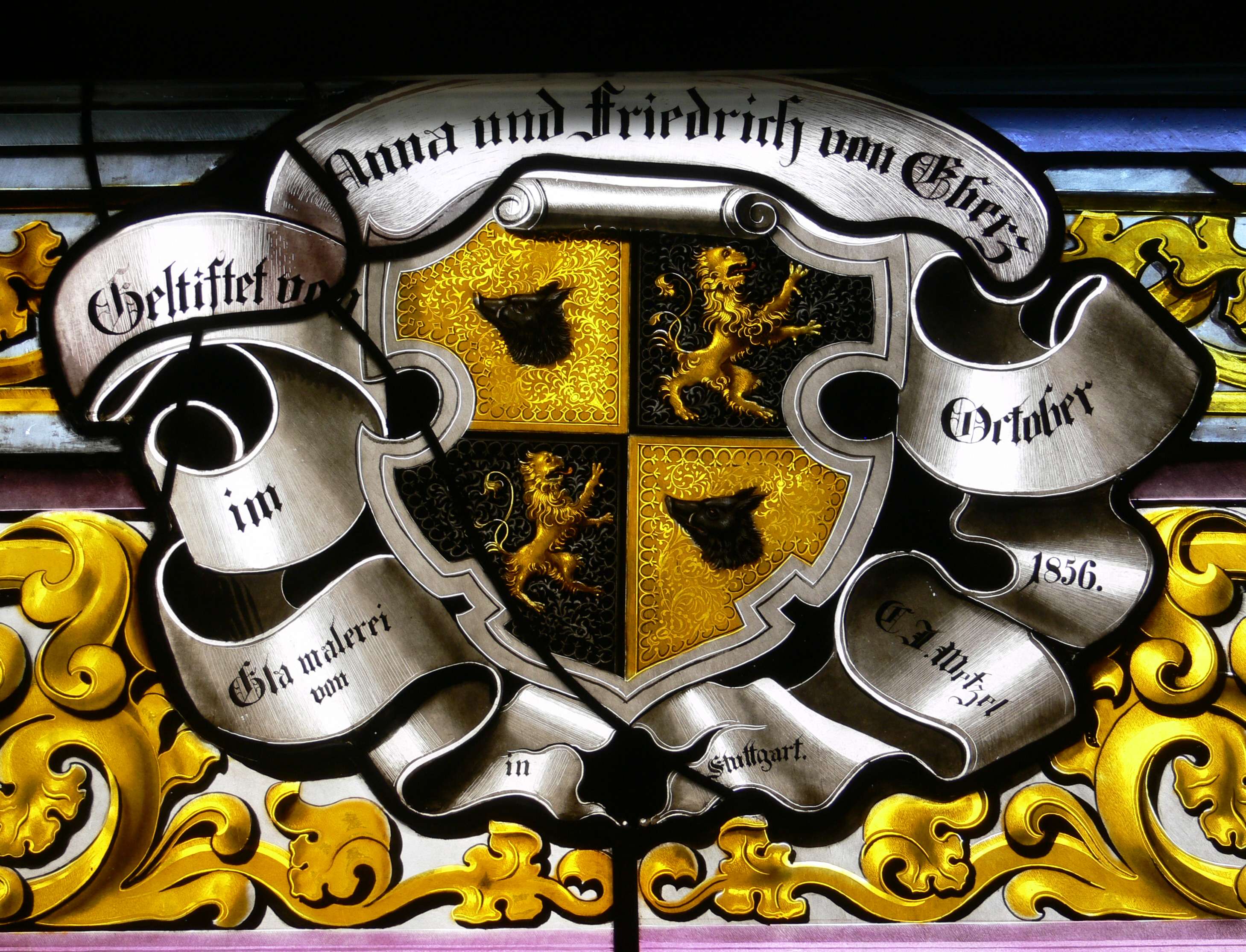 Isny im Allgäu, Nikolaikirche, Glasfenster "Evangelist Johannes", Detail: Stifterwappen Eberz, datiert 1856